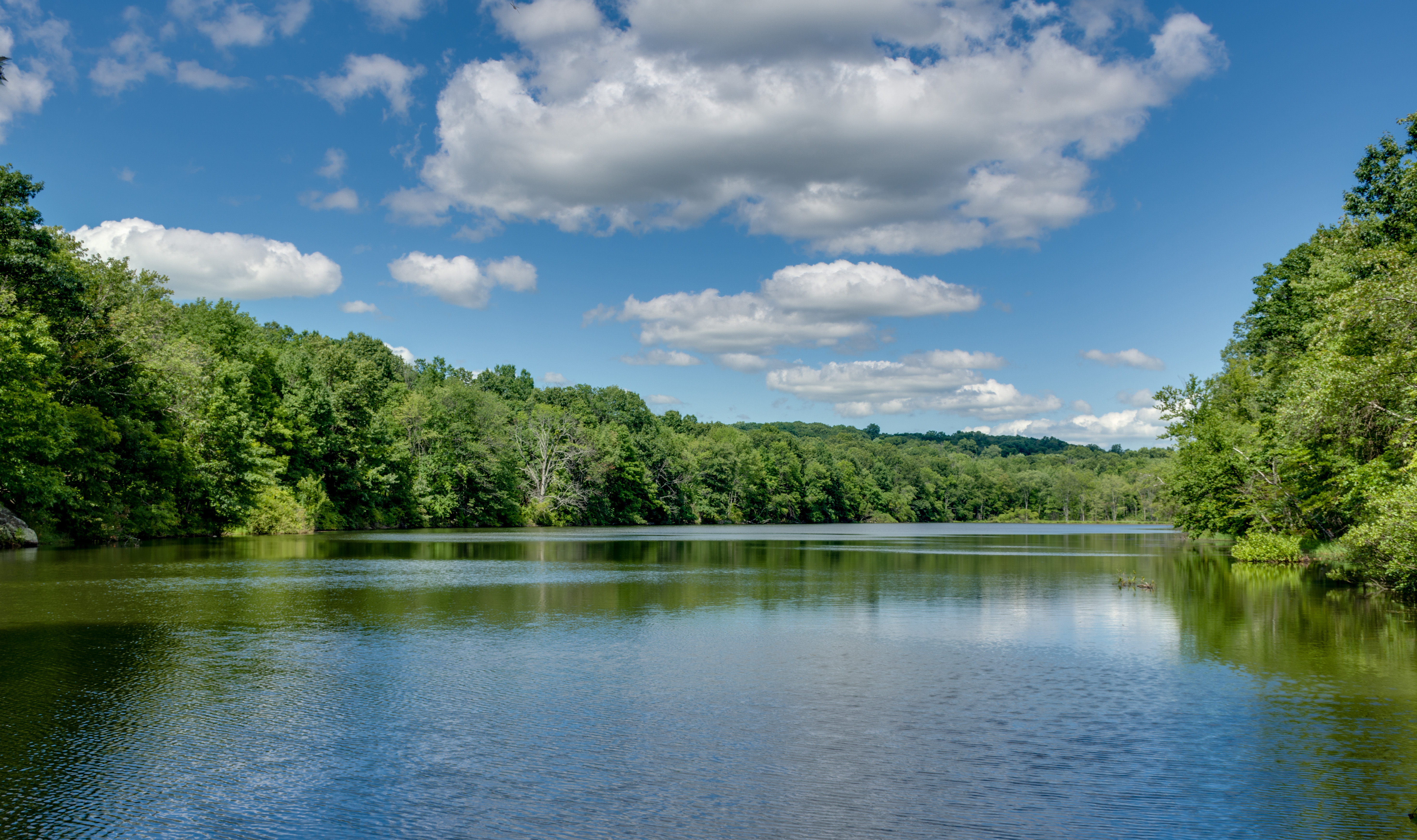 Still Forest Lake in Summer